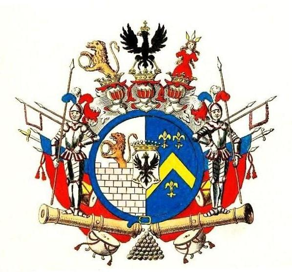 Wappen der preußischen Grafen von der Goltz (neumärkischer Uradel), wie es dem Haus Heinrichsdorf der Linie Heinrichsdorf von König Friedrich Wilhelm II. von Preußen am 19. November 1786 verliehen wurde (die Burgmauer im Schild ist eigentlich rot tingiert)